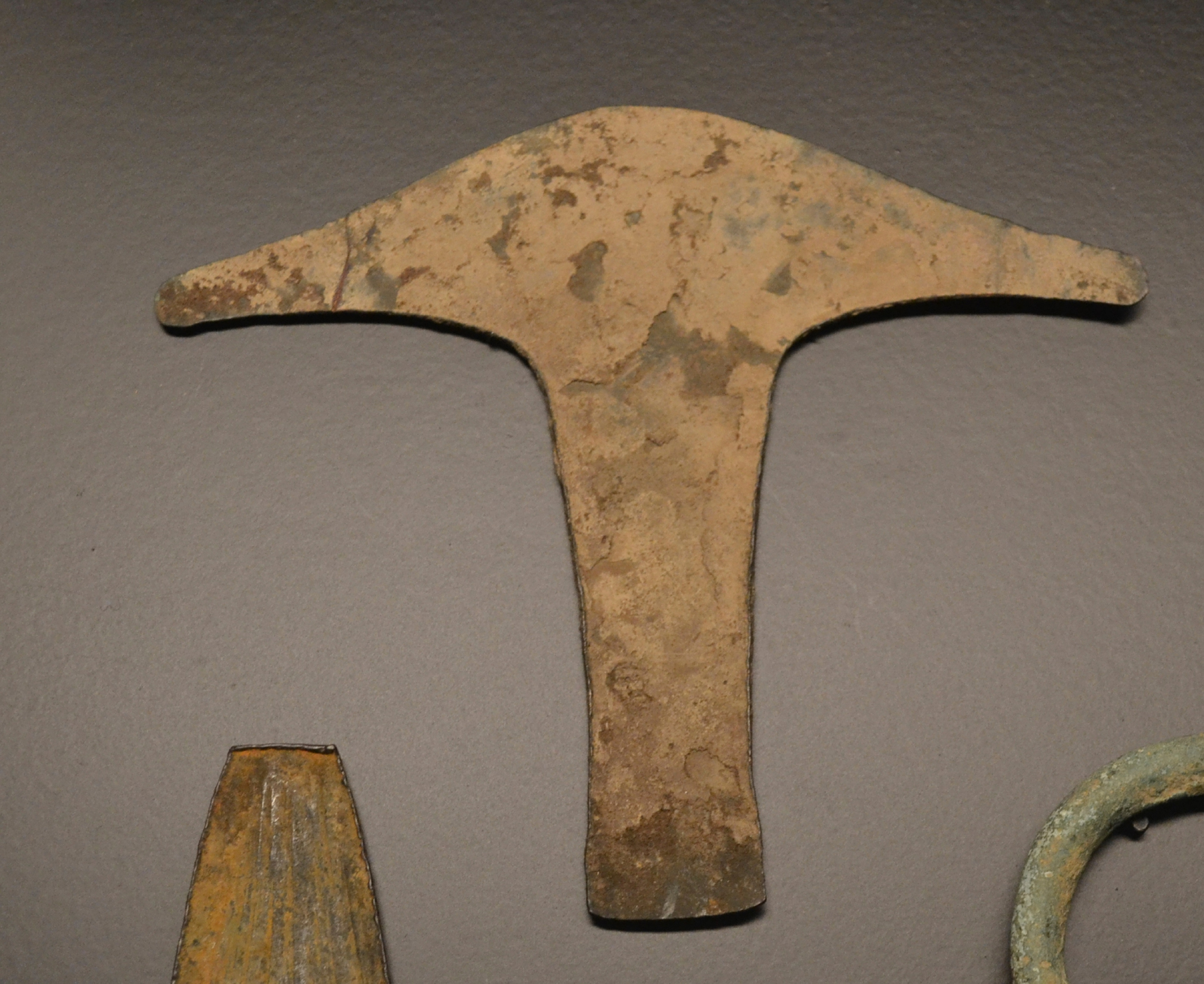 Dinero azada de Mexico (siglos XIV-XV). Museo de Prehistoria de Valencia.